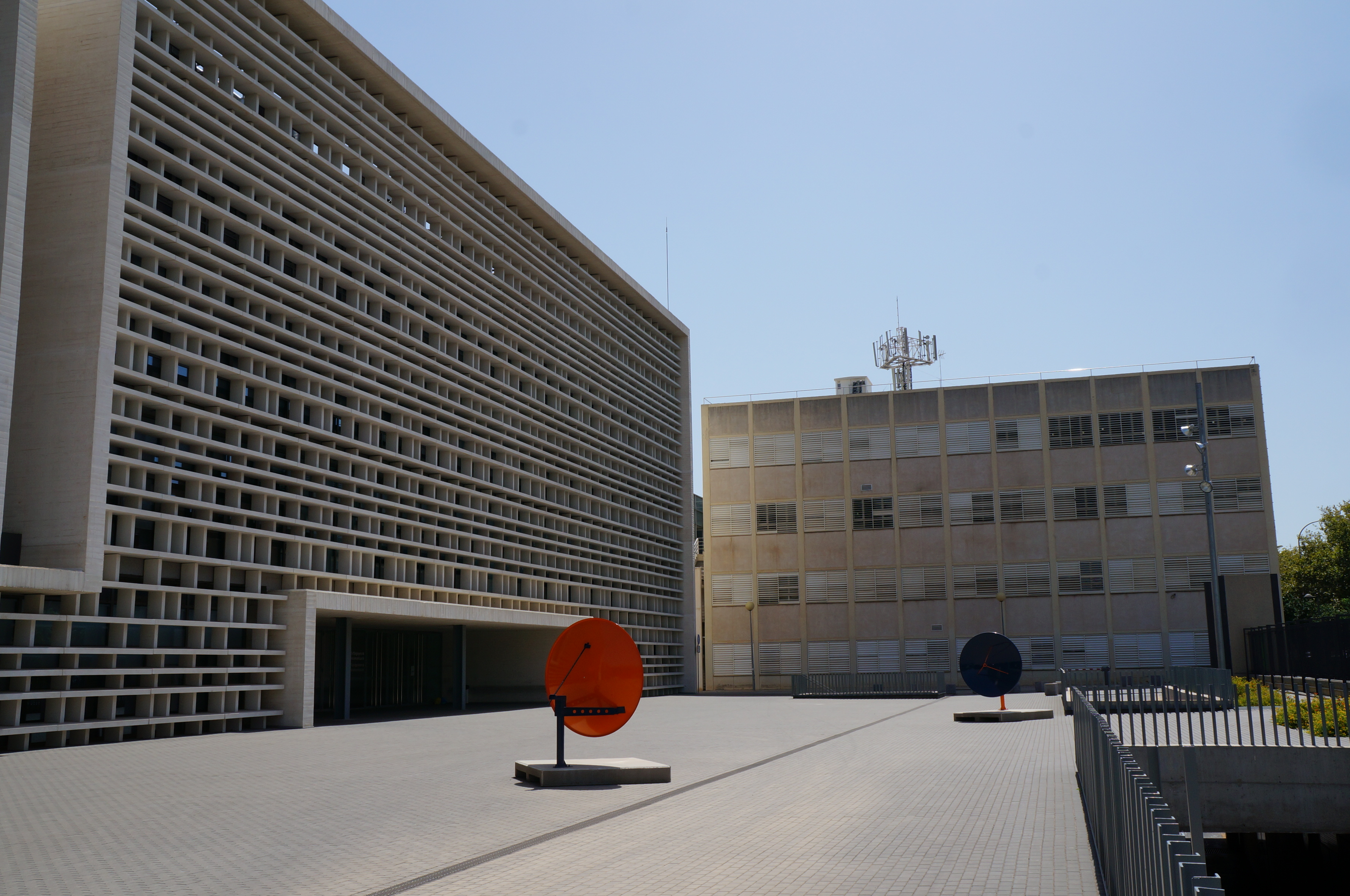 Escuela Técnica Superior de Ingenieros de Telecomunicación - TelecomVLC- de la Universitat Politècnica de València - UPV